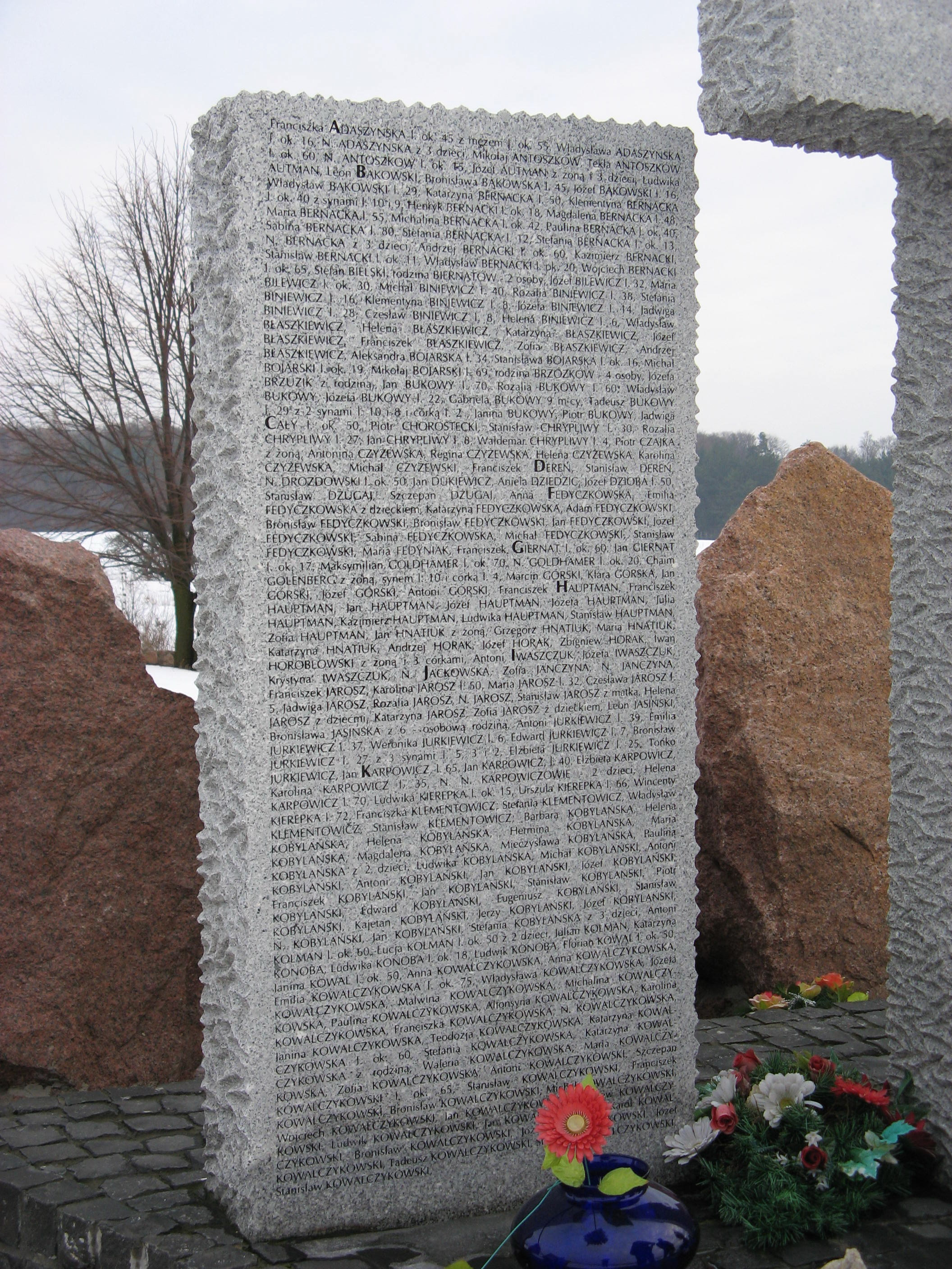 Jedna z tablic z nazwiskami ofiar na pomniku poświęconym pamięci ponad 1000 Polaków zamordowanych przez 5 pułk policyjny SS i ukraińskie oddziały SS Galizien w Hucie Pieniackiej 28 lutego 1944 roku.